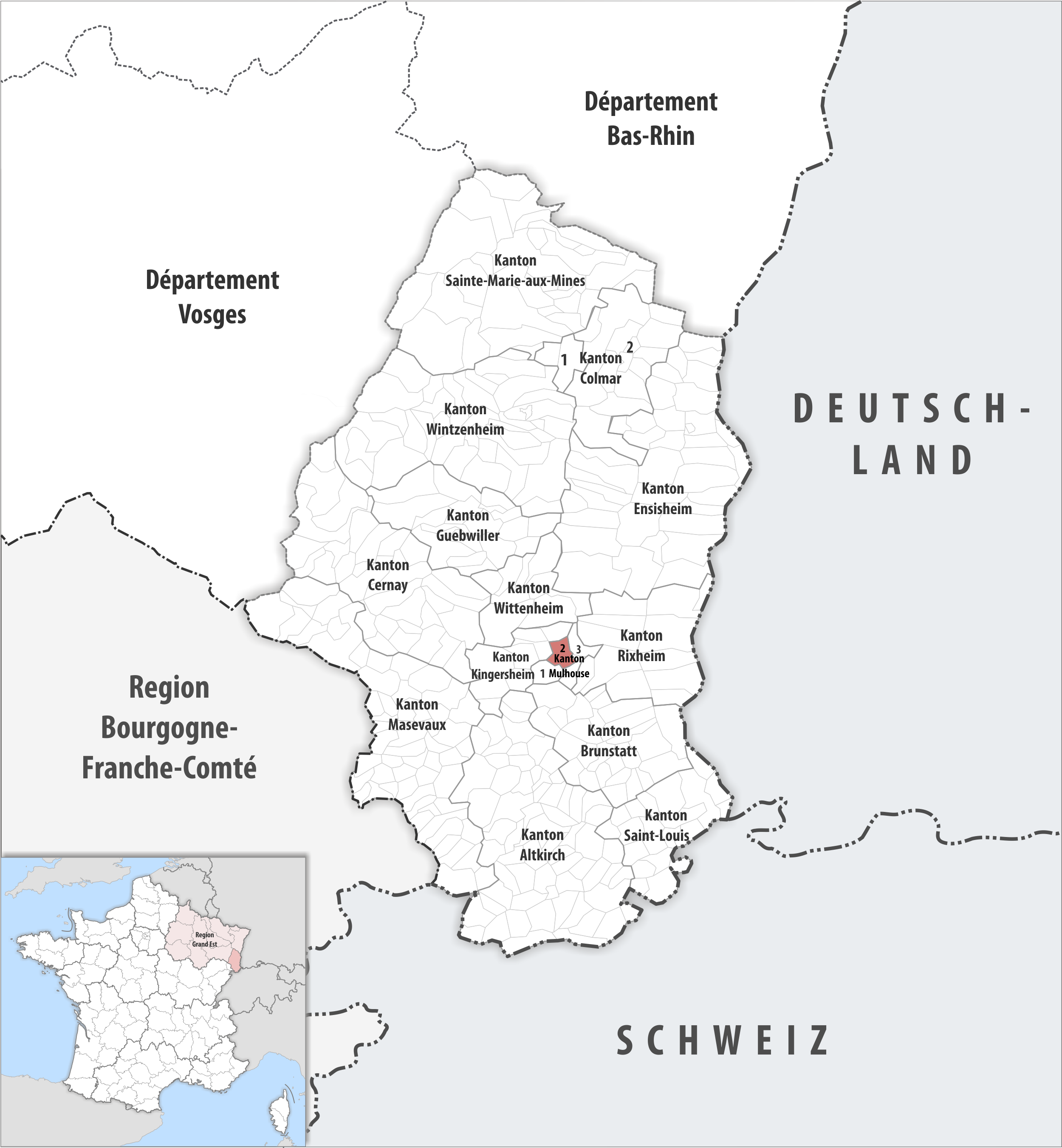 Lage des Kantons Mulhouse-2